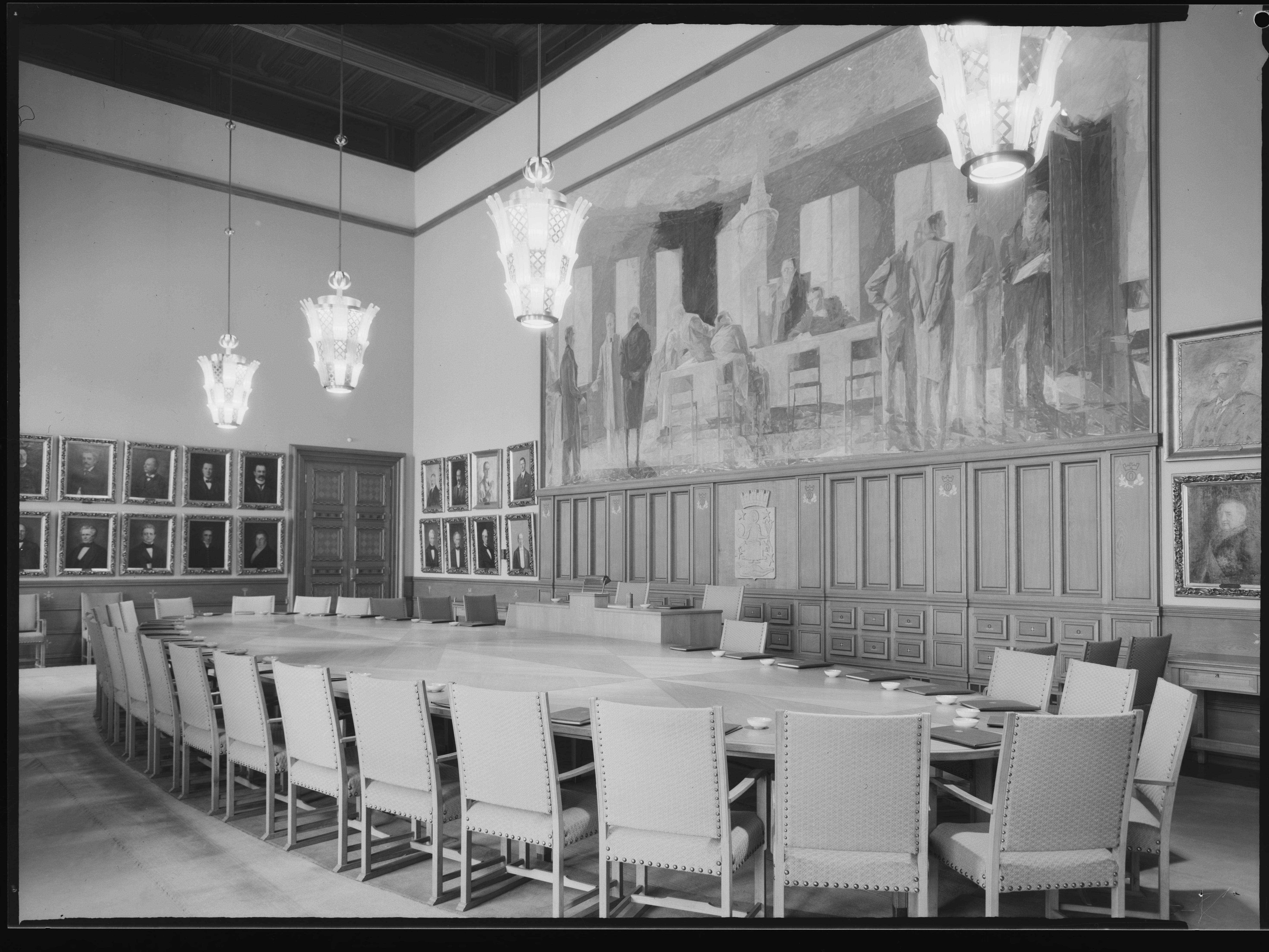 Bildet er hentet fra Nasjonalbibliotekets bildesamling Oslo,Rådhusplassen, Oslo, Oslo